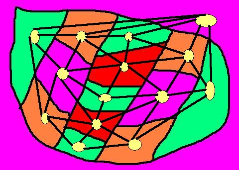 انتاج شخصي